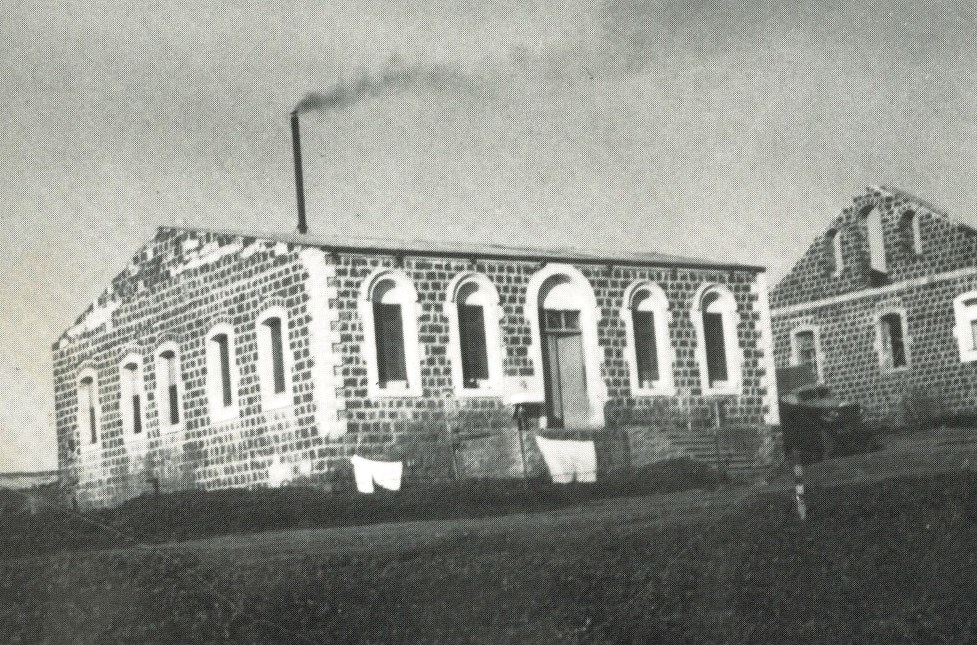 חדר האוכל של הקבוצה שישבה באחוזת פוריה בשנים 1941-1947